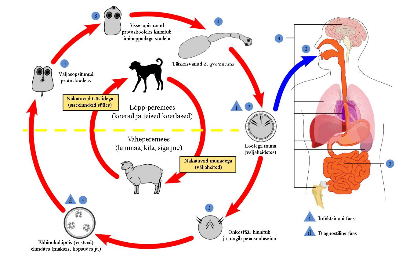 Ehinococcus granulosus´e arengutsükkel